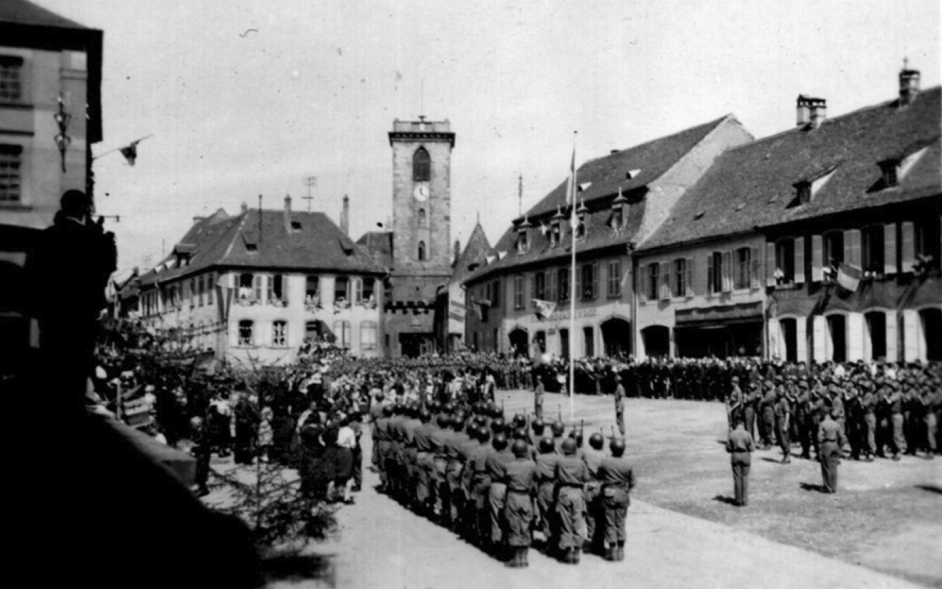 2ème Division blindée, cérémonie de la Libération de Wasselonne novembre 1944